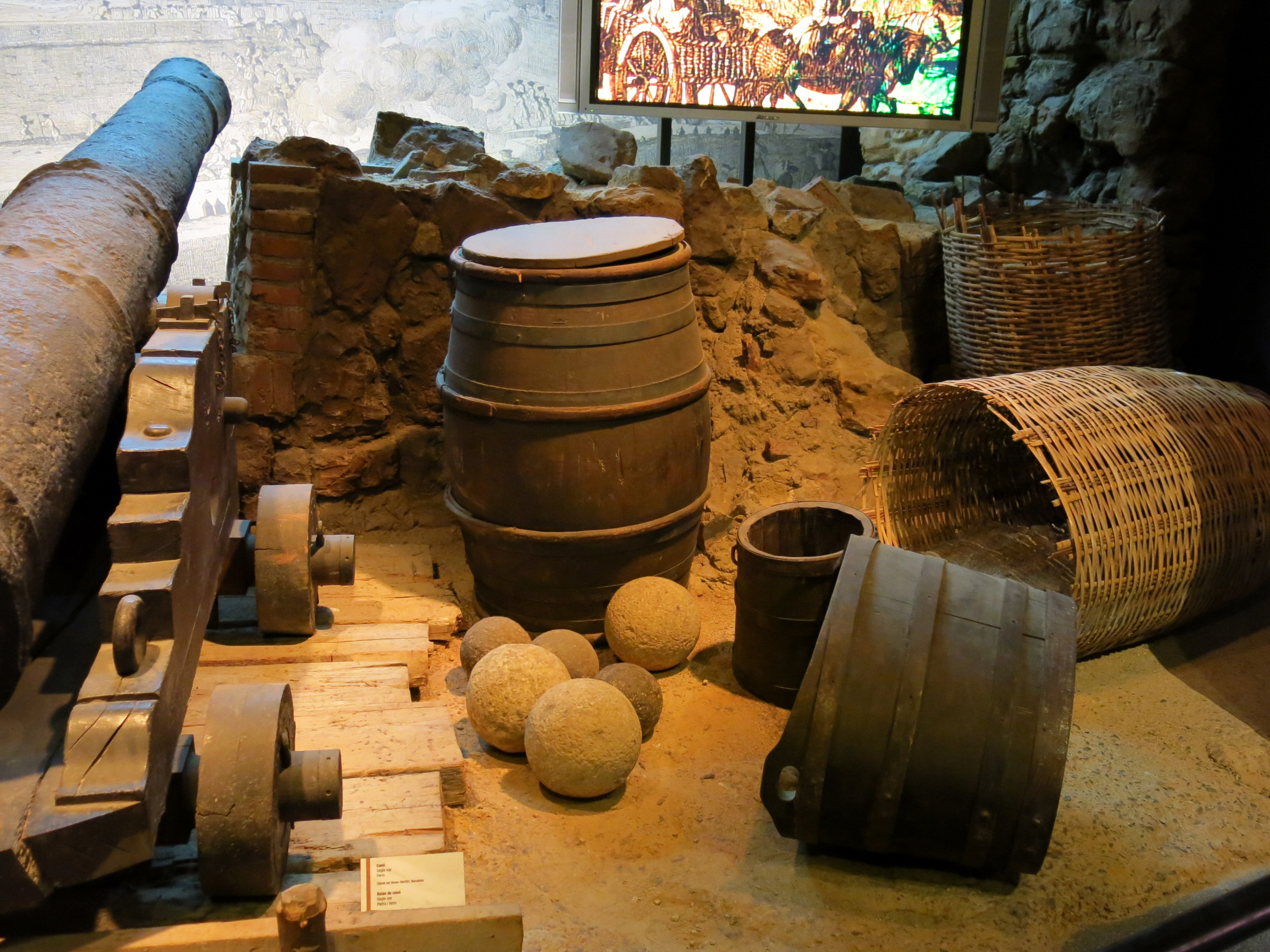 Magatzems generals del Dipòsit (Barcelona). Inclouen el Museu d'Història de Catalunya